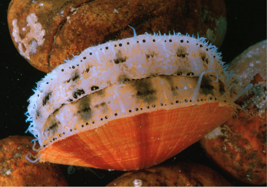 Hafdiskur.